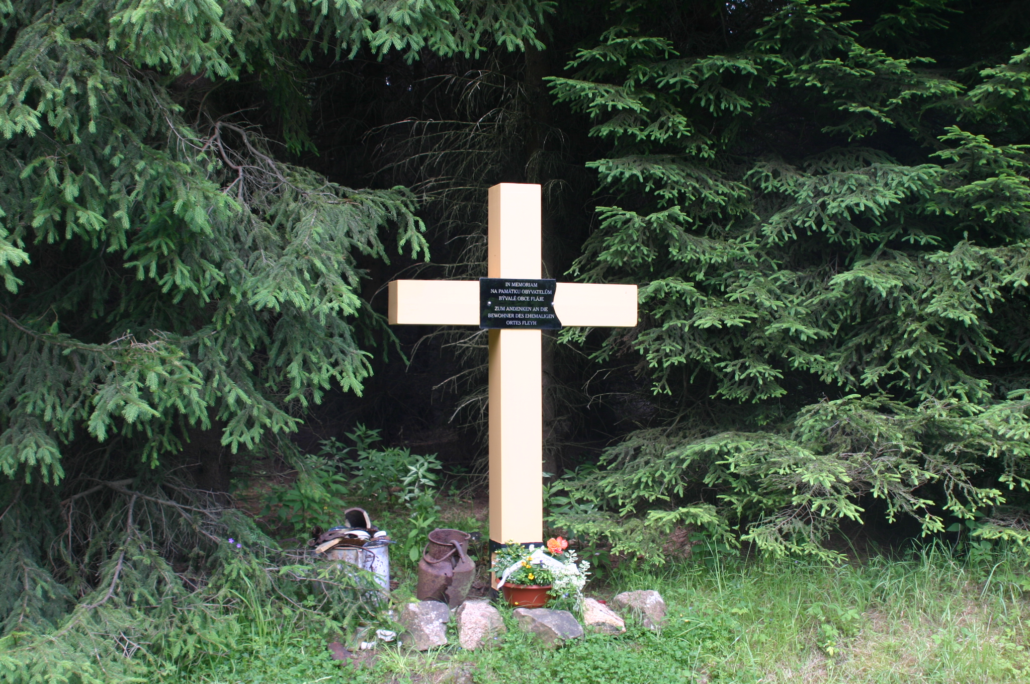 Pomník na zaniklou obec Fláje v okrese Most.